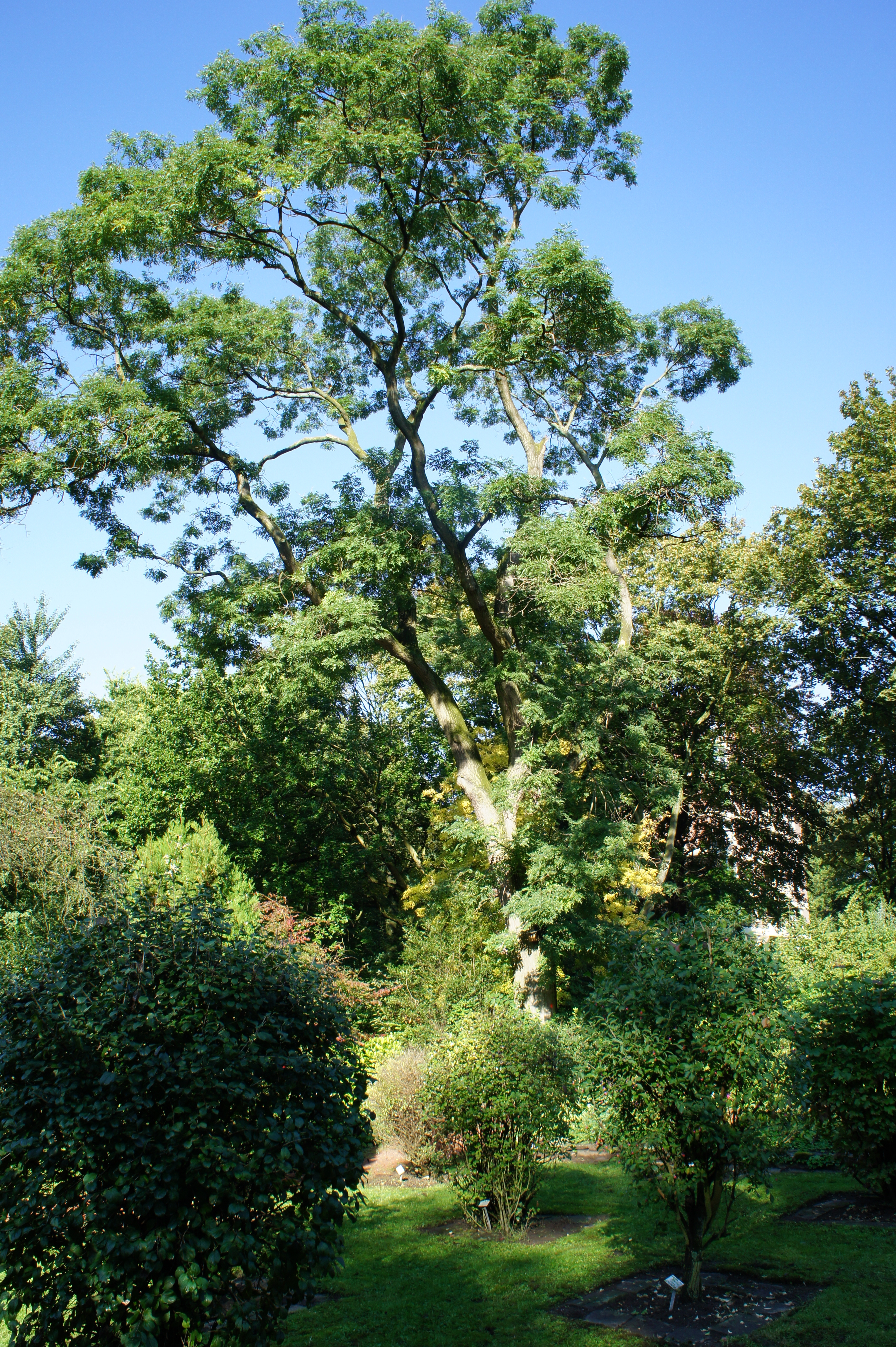 Botanischer Garten in Duisburg-Duissern